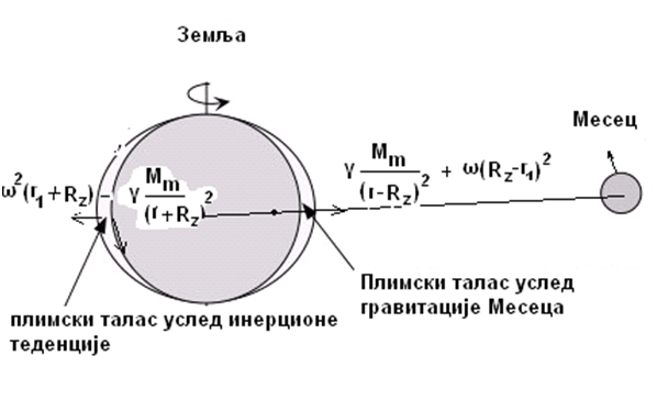 Плима и осека